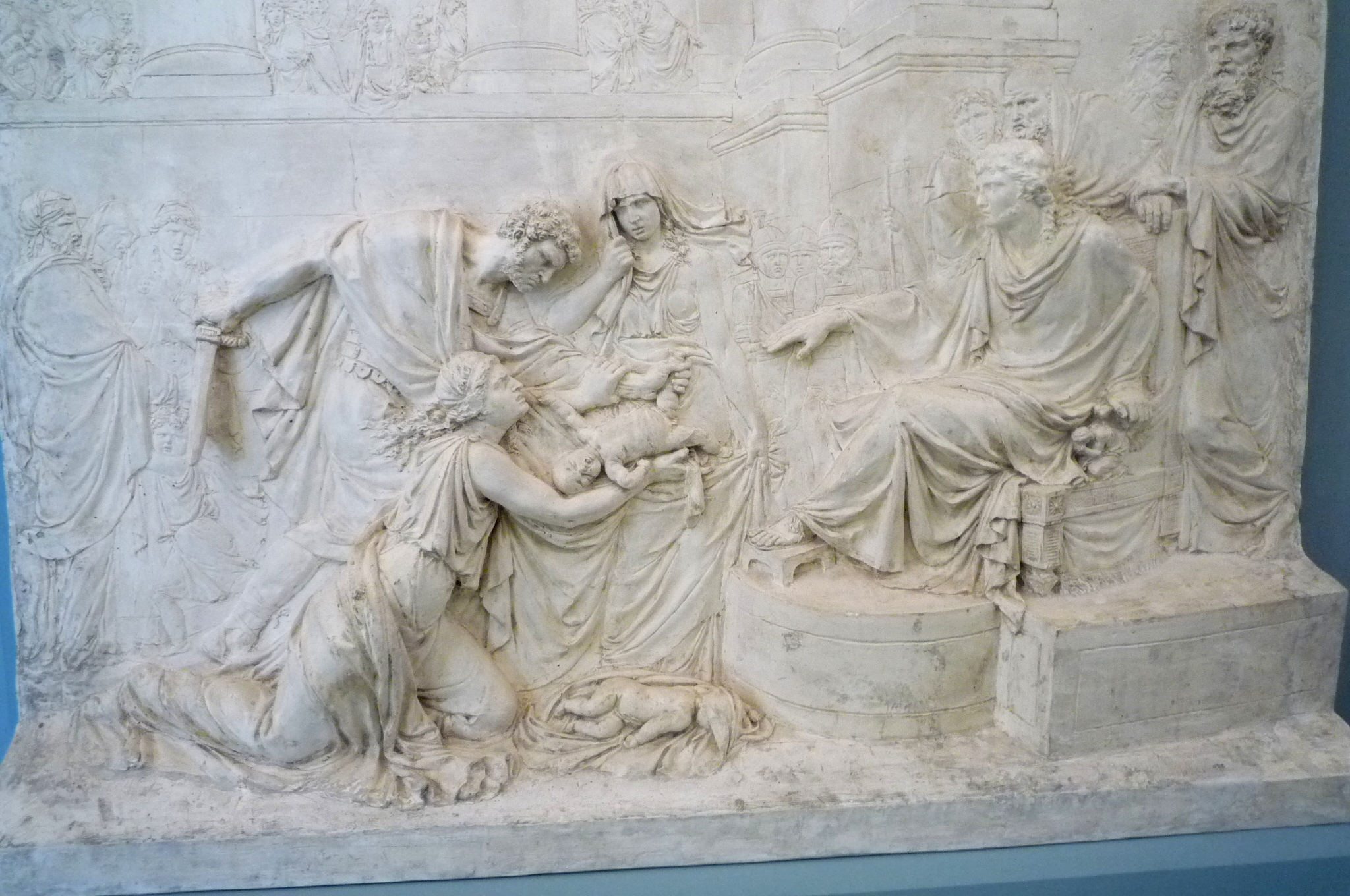 Bas relief du Jugement de Salomon, (1790), François Lemot, Musée de la Révolution française - Vizille